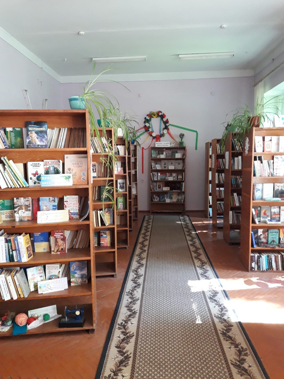 Абонемент бібліотеки-філії №2 Хмельницької міської ЦБС, червень 2019.